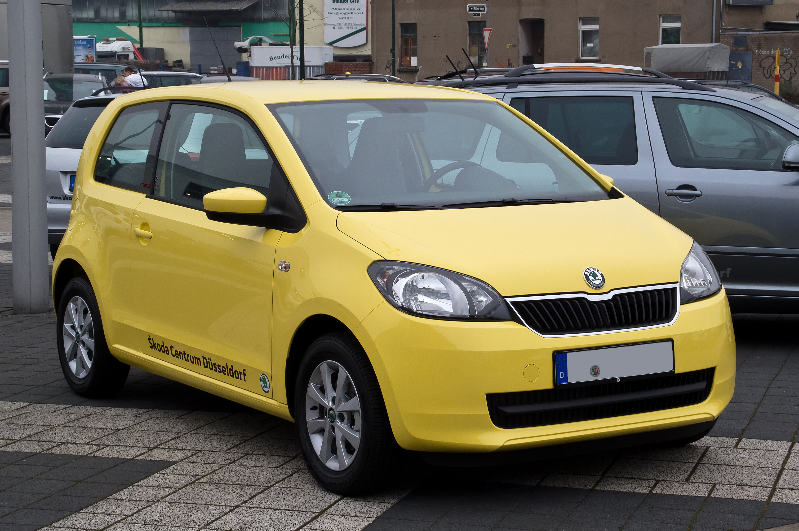 Skoda Citigo 1.0 Ambition